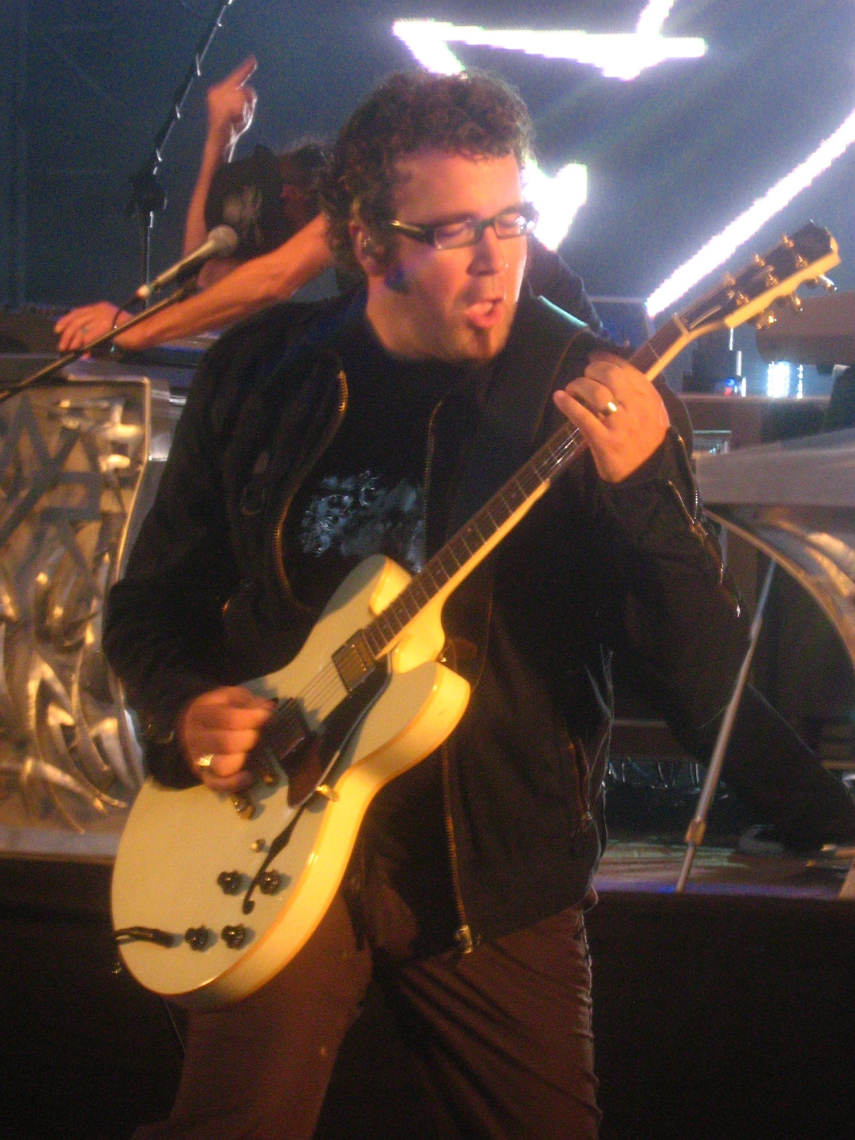 Uwe Bossert z zespołu Reamonn podczas koncertu w Teatrze Letnim w szczecinie. 5 lipca 2008.